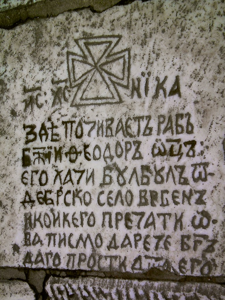 Надгробна плоча от дебърското село Връбник.